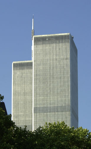 World Trade Center Material: Nikon D1, 24-120mm (80mm/F9.5/ 1/350sec)